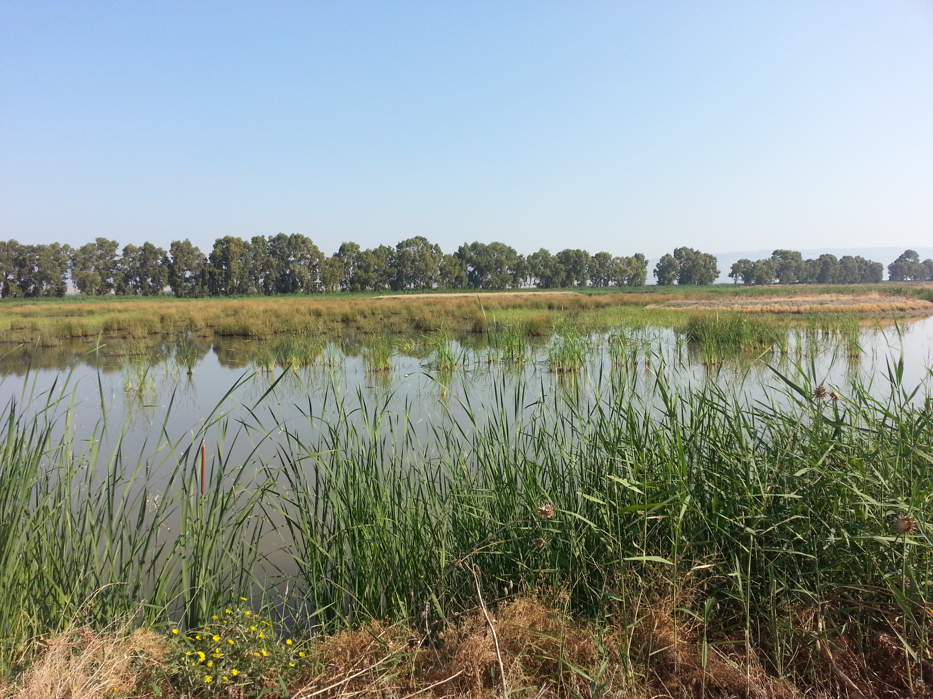 Lago Salso This is a photo of a monument which is part of cultural heritage of Italy. The authorisation for taking photos of this object was provided by the World Wide Fund for Nature Italy.